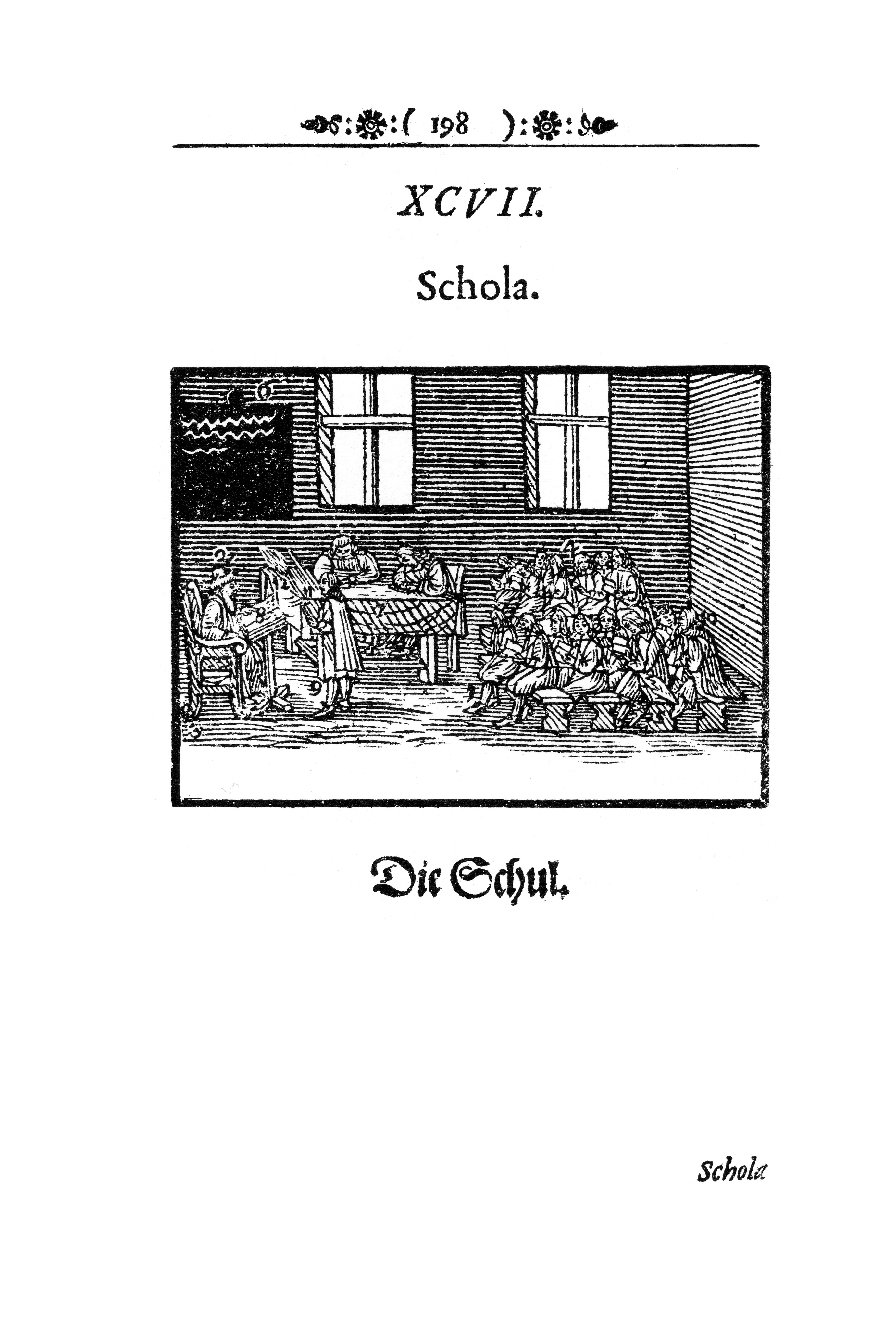 Comenius: Orbis sensualium pictus. Public Domain